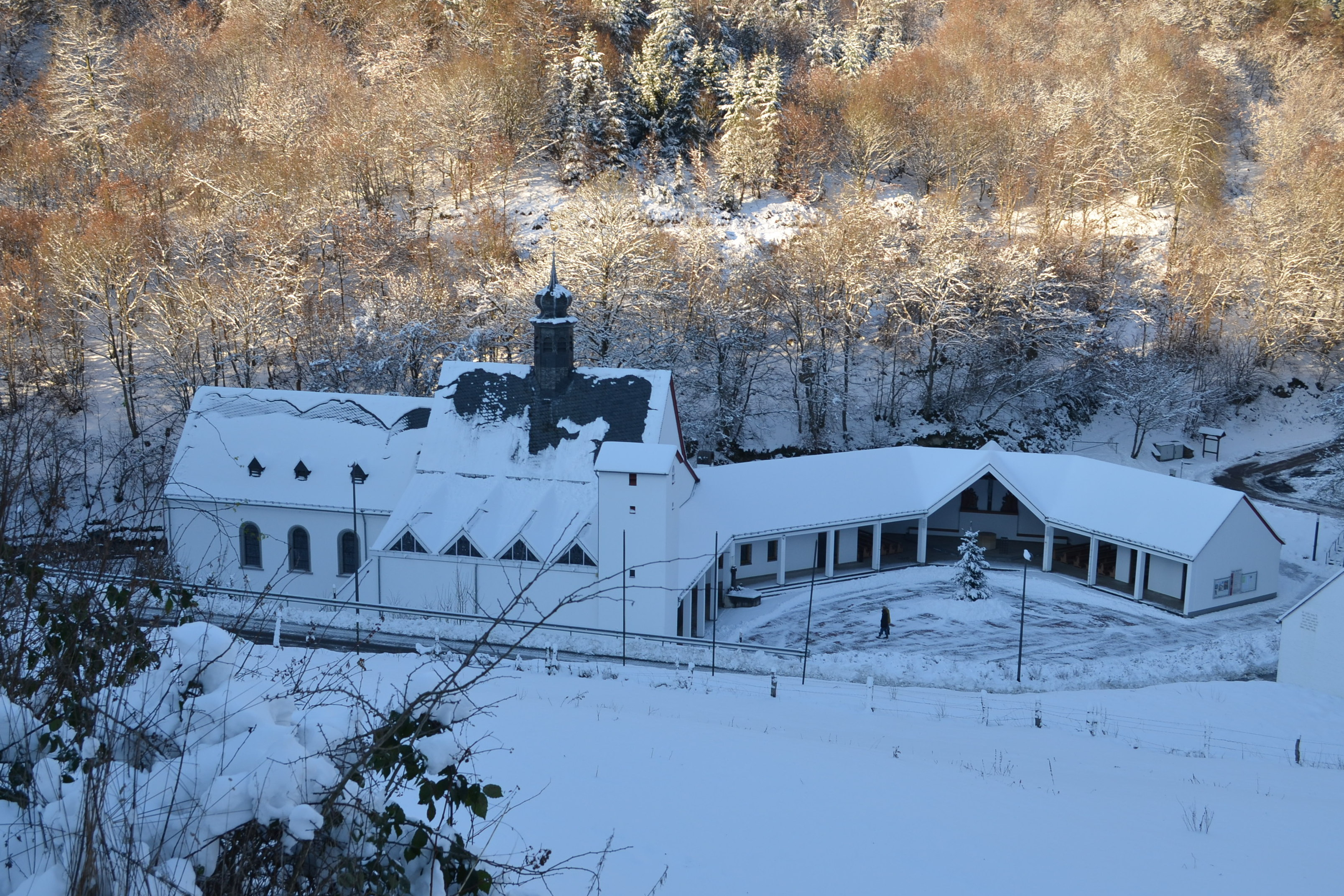 bedevaartskerk Maria Martental